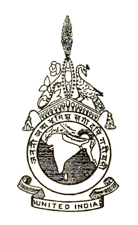 Symbol of Anushilan Samiti (1902-1936)